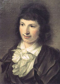 Marianne Kraus (died 1838), olieverf op doek, schilder onbekend.